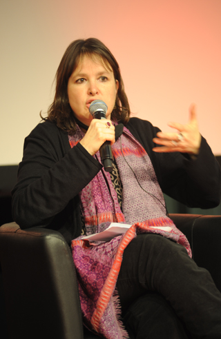 Die Bundestagsabgeordnete und entwicklungspolitische Sprecherin der Fraktion DIE LINKE. im Bundestag Heike Hänsel und ihr MitarbeiterInnenteam haben die Konferenz »Das andere Afghanistan« in Zusammenarbeit mit vielen MdBs und Mitarbeitern des Arbeitskreises Internationale Politik federführend konzipiert und organisiert.